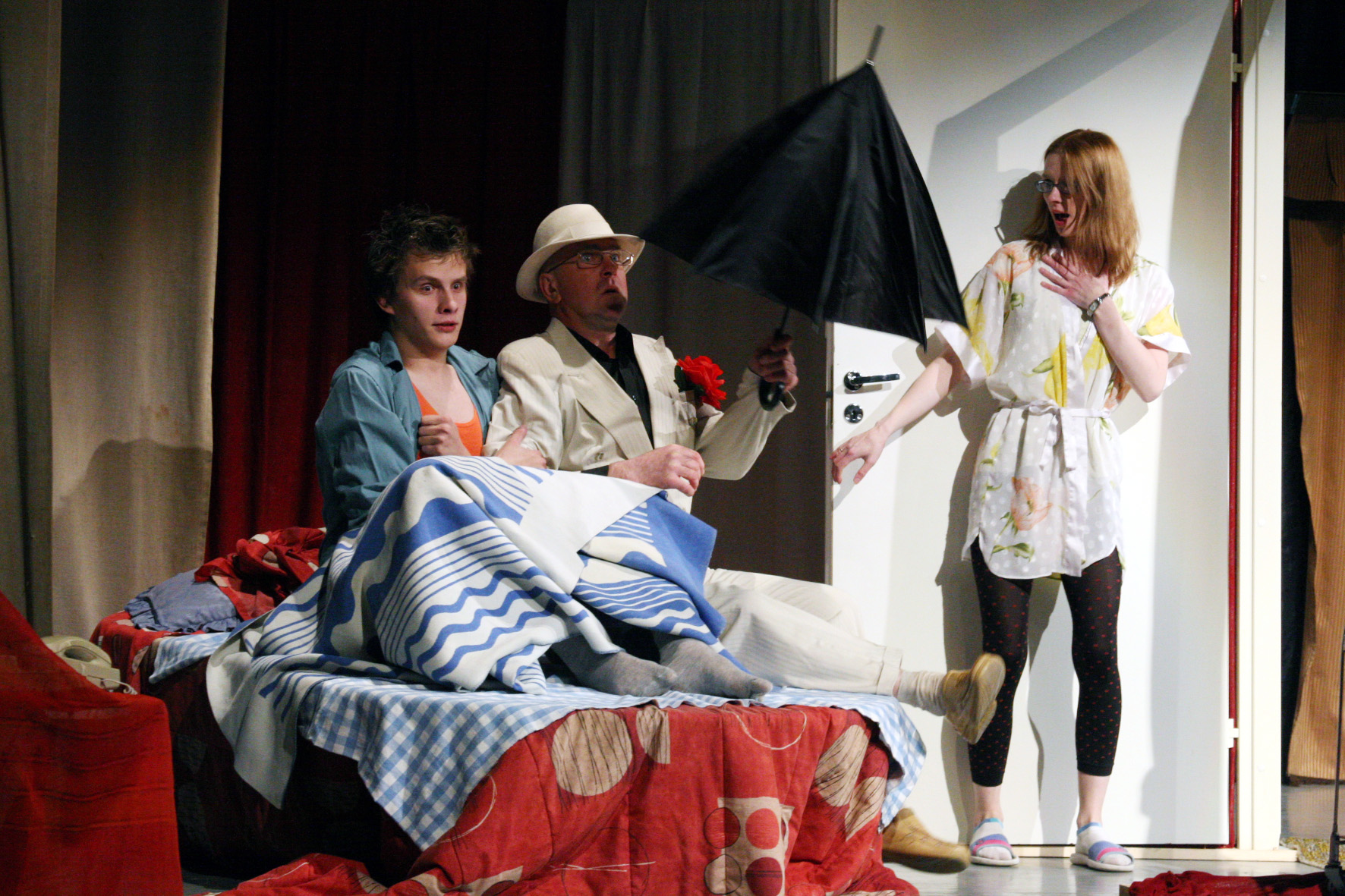 Marchel Mithosi komöödiat "Voodi" esitab Rannu külateater "Emu"